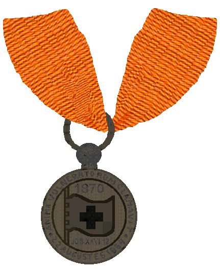 De door Koning Willem III gestichte medaille, eigen reconstructie